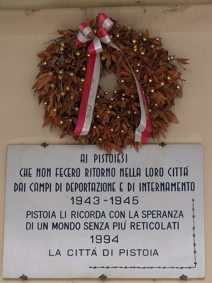 lapide commemorativa per i pistoiesi deportati durante gli anni 1943 1945